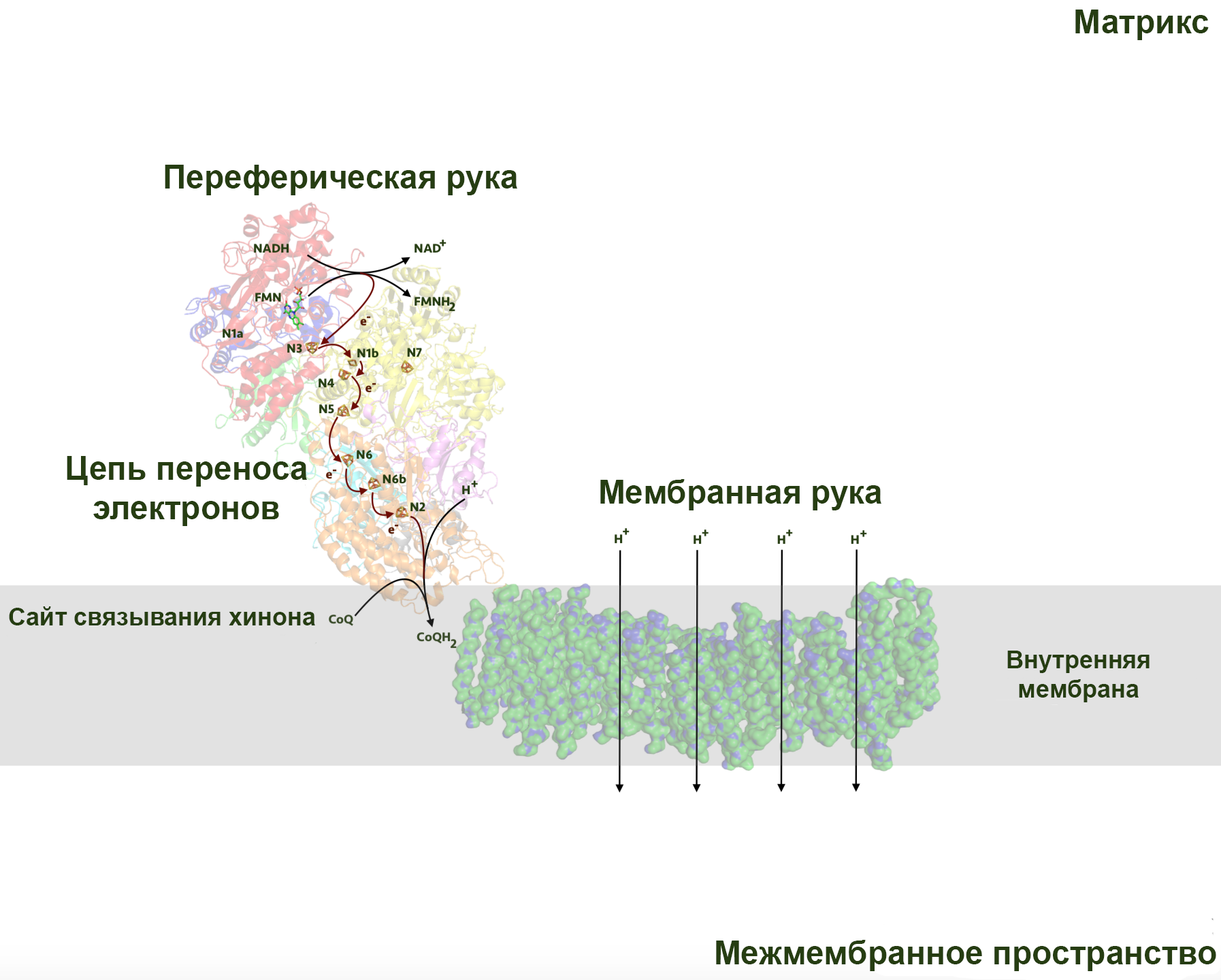 Механизм работы НАДН-дегидрогеназного комплекса.